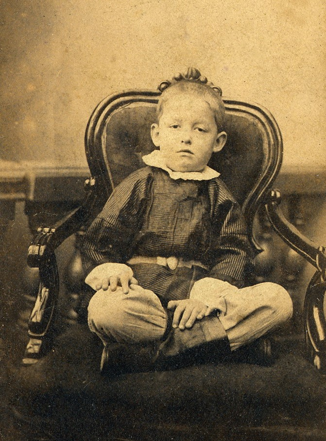 К.Э.Циолковский в детстве (1862 г.)